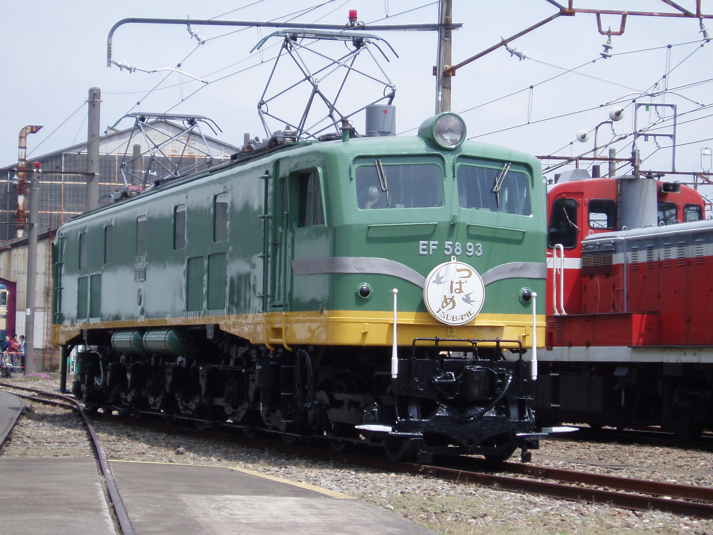 大宮総合車両センターで展示されたEF58 93－「JRおおみや 鉄道ふれあいフェア2009」にて